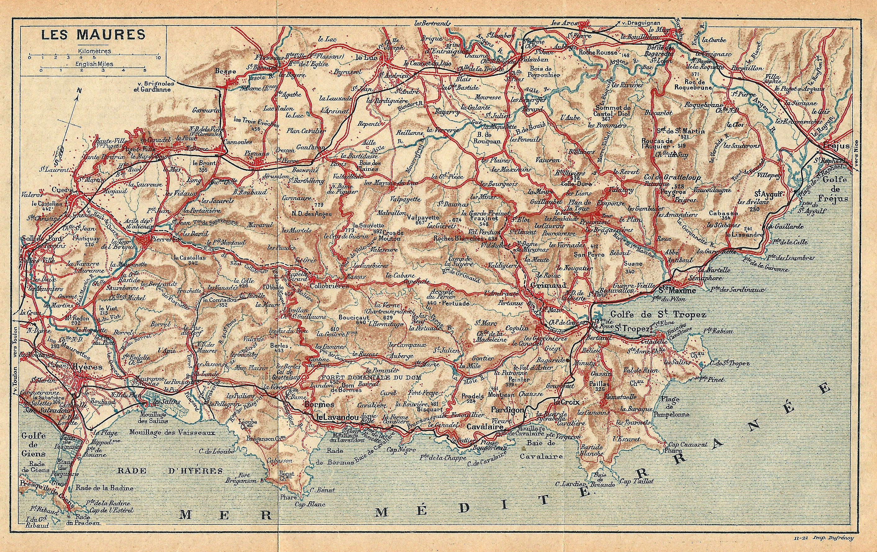 Carte de la Provence (1921) : Les Maures